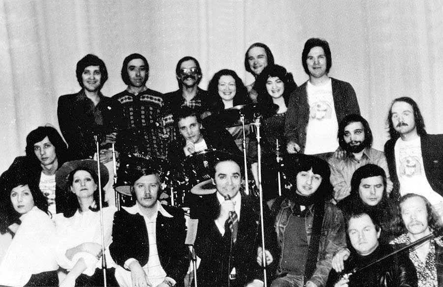 Группа "Цветы" с вокальной и скрипичной группой. 1978 год